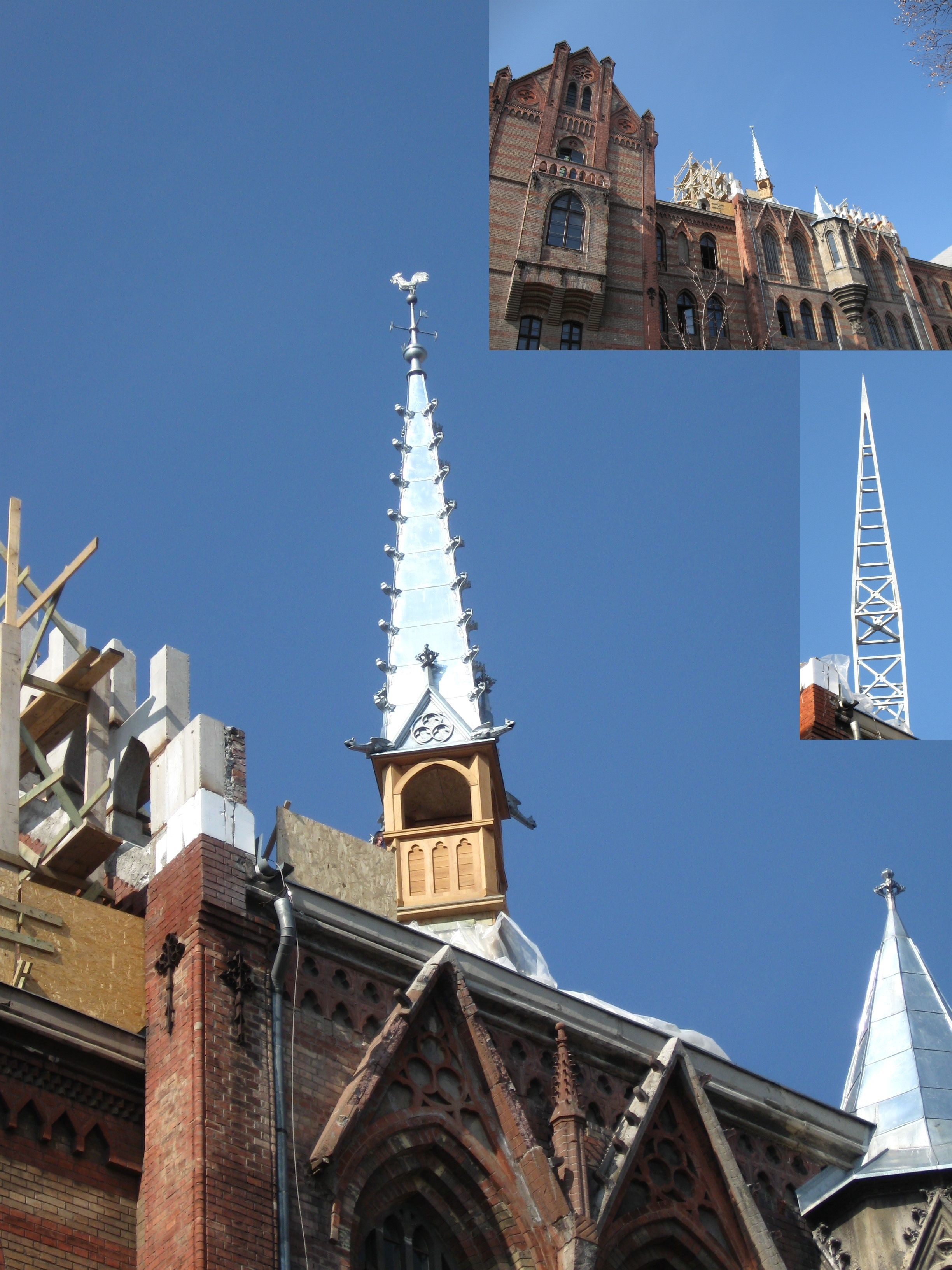 A budapesti Toldy Ferenc Gimnázium 2010 márciusában újjáépített huszártornya szerkezeti és kész állapotában (montázs). A nagy képen a huszártorony részletei, a jobb felső sarokban a torony elhelyezkedése az épületen, alatta a szerkezet (annak a felvételnek a készítési ideje: 2009. december 15.)